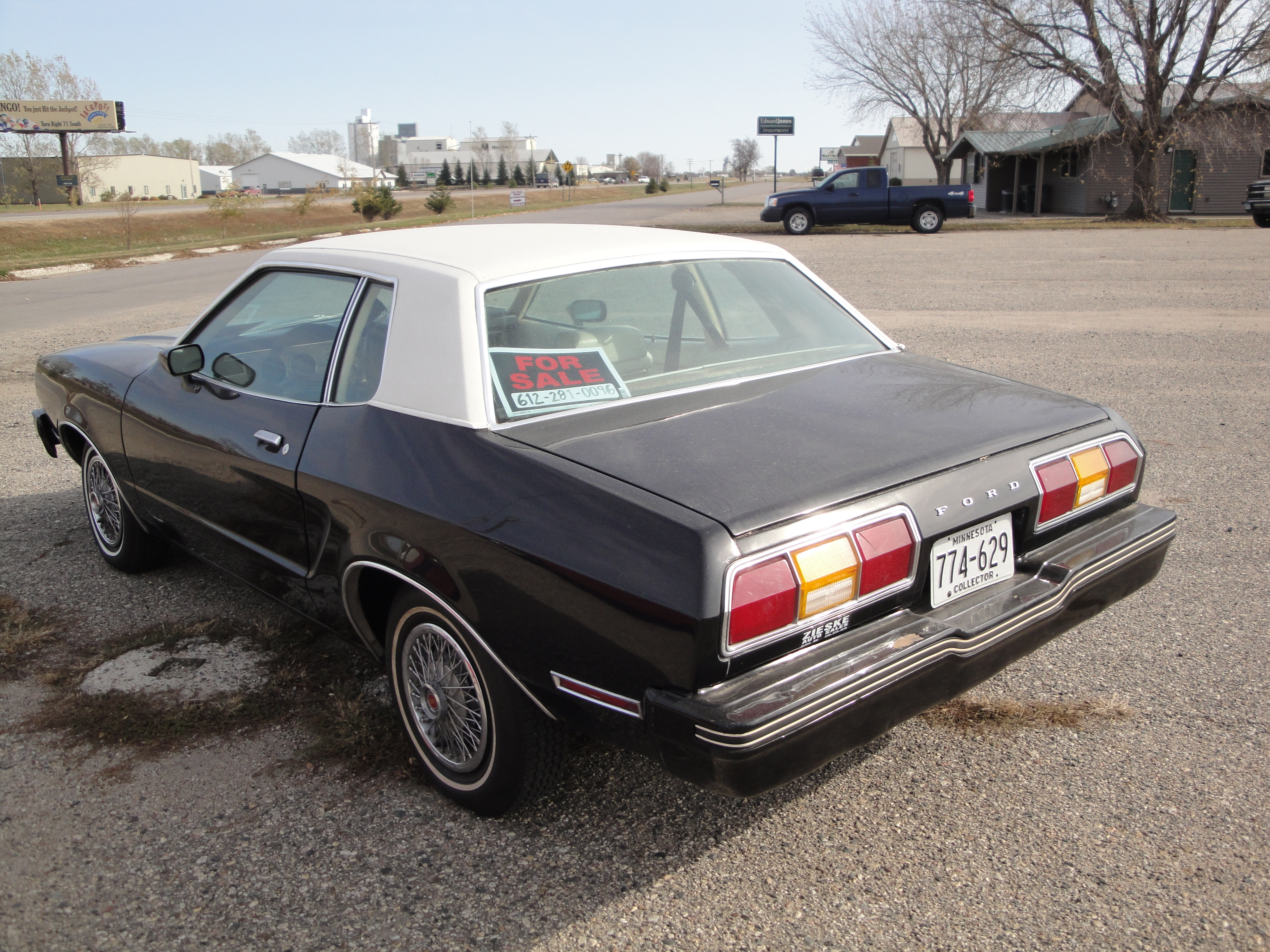 78 Ford Mustang II